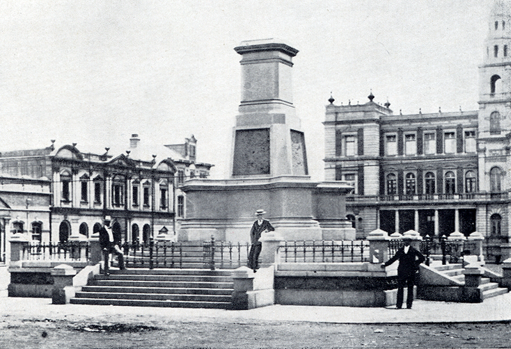 Piedestal de la statue de Paul Kruger à Pretoria